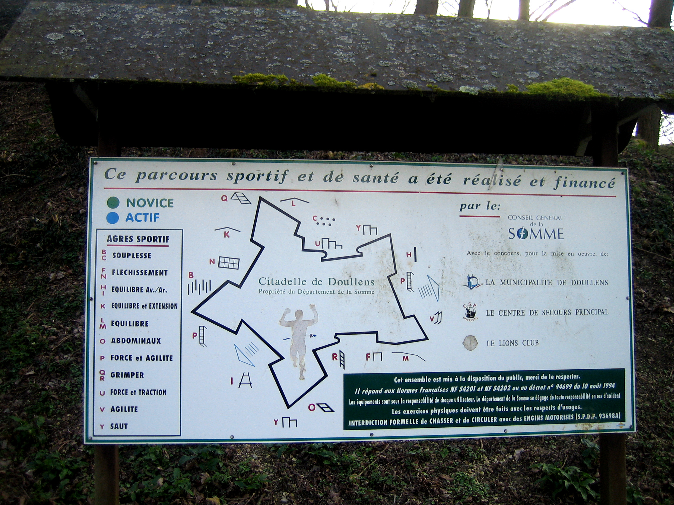 Doullens (Somme), France - Parcours sportif autour de la Citadelle. Panneau à l'entrée du site, sur la gauche. Un autre panneau exactement semblable est installé à un autre endroit, dans le large sentier (fossé) le long de la muraille.